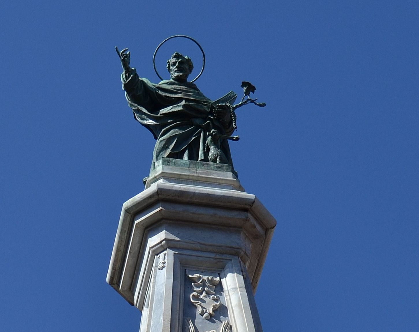 Obelisco di San Domenico Maggiore - Particolare della statua di san Domenico